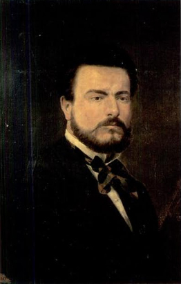 Retrato de Miguel Vico Hernández.